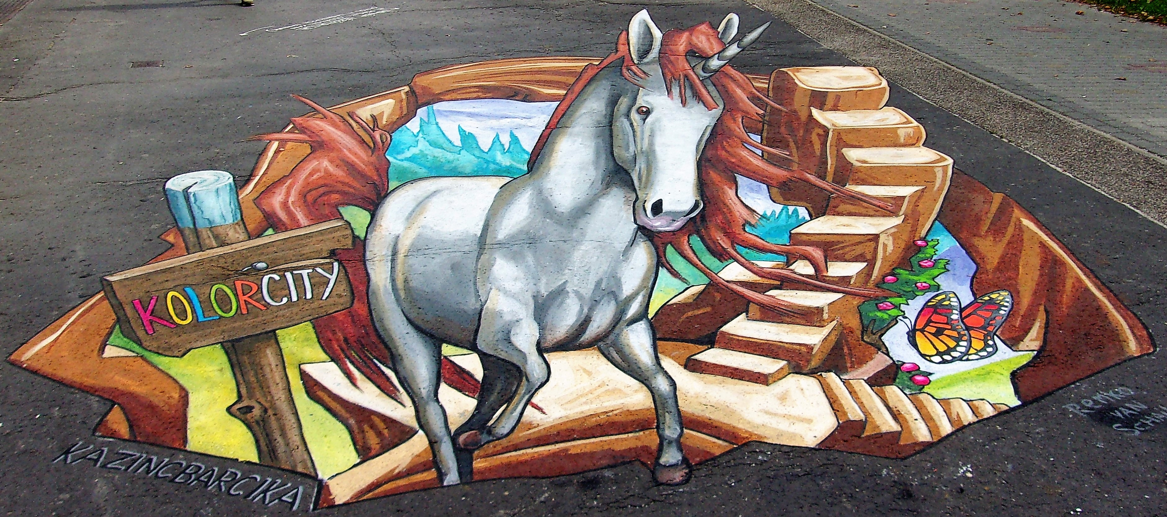 Kazincbarcika, Fő tér 2. - Remko Van Schaik: 3D unikornis (aszfaltfestés)